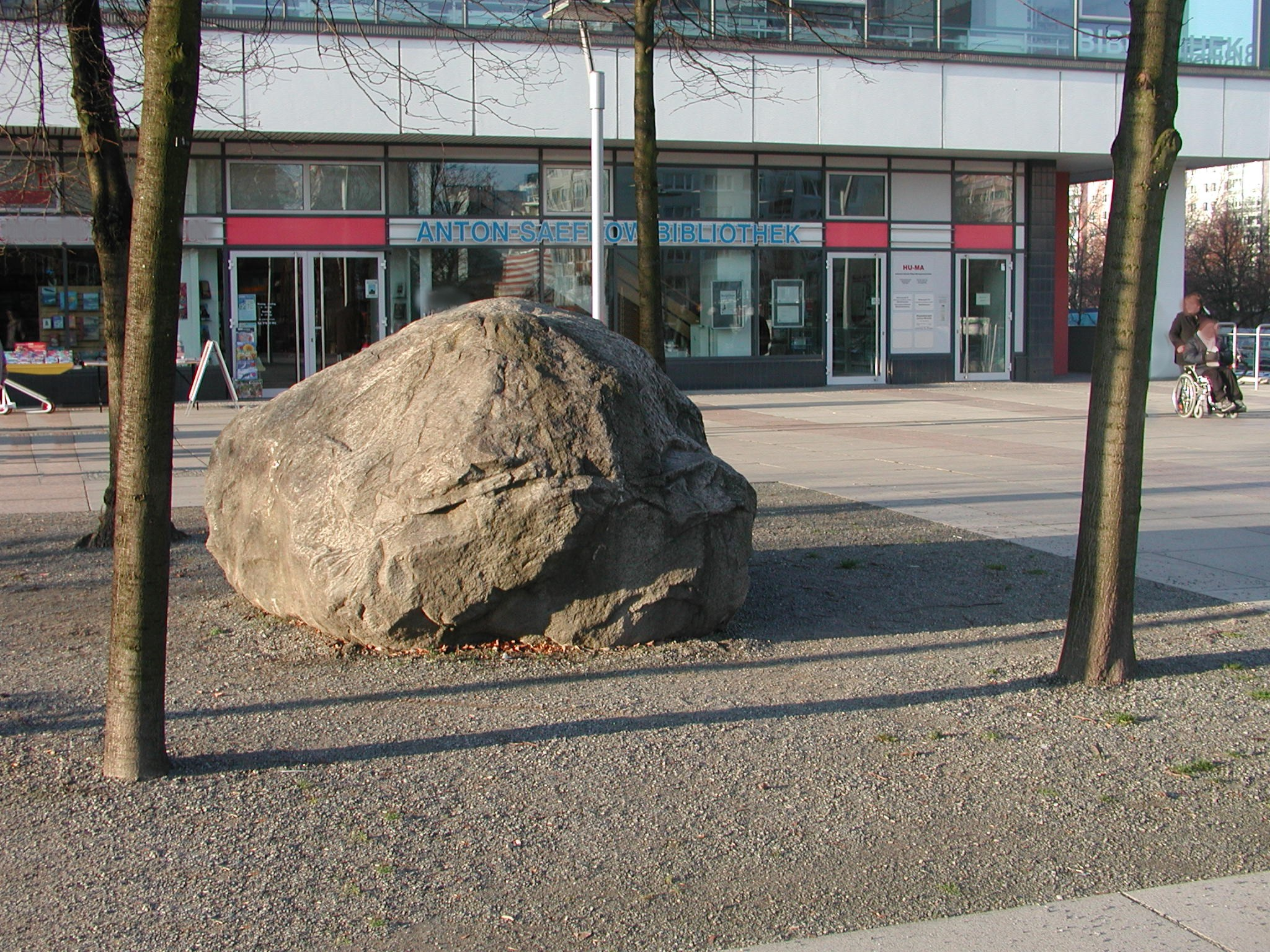 ehemaliger "Findlingsbrunnen" von Lothar Scholz; heute liegt nur noch der Findling am Fennpfuhlpark